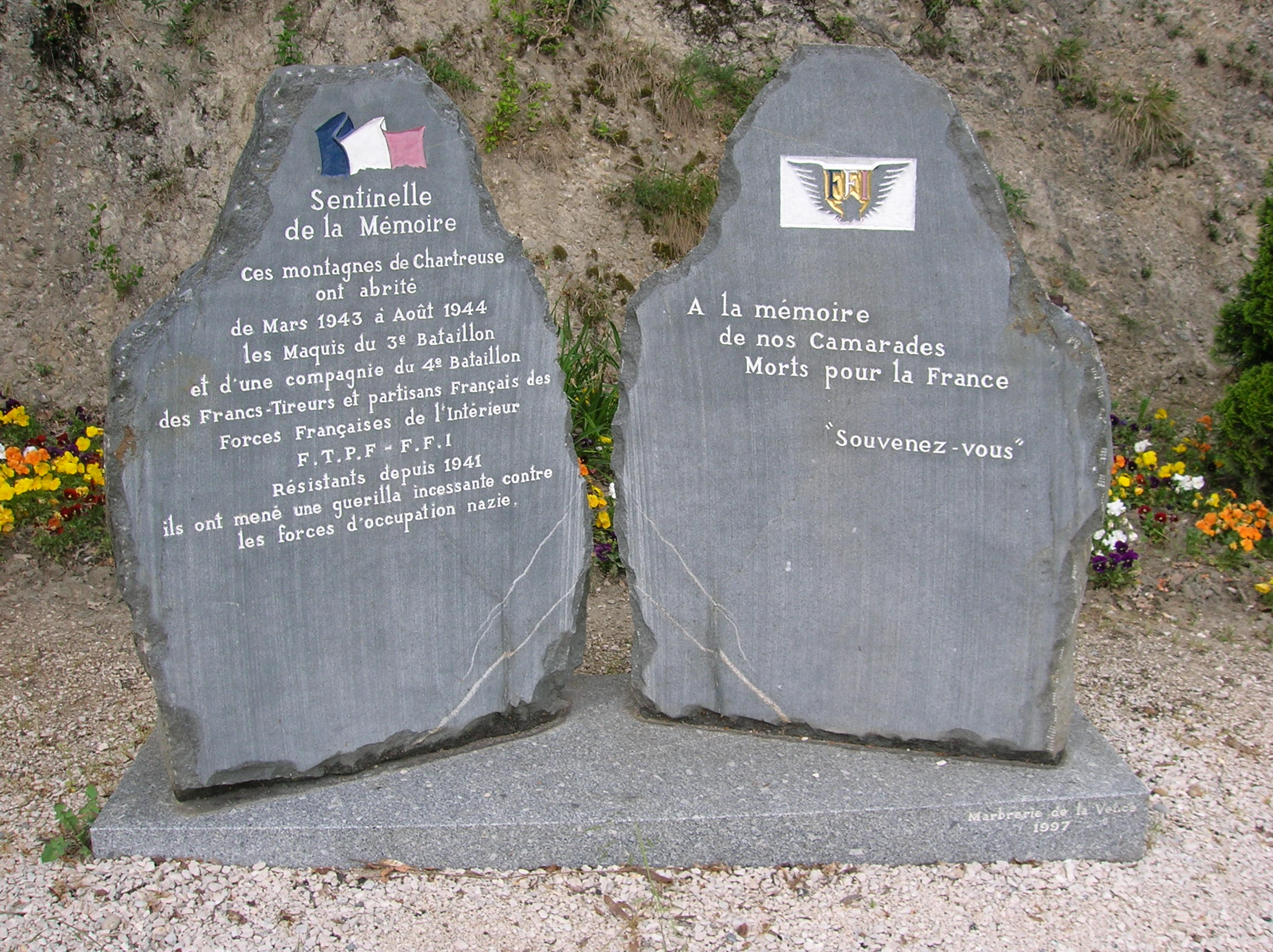 Mémorial du Maquis de la Chartreuse à Saint-Égrève (Isère)